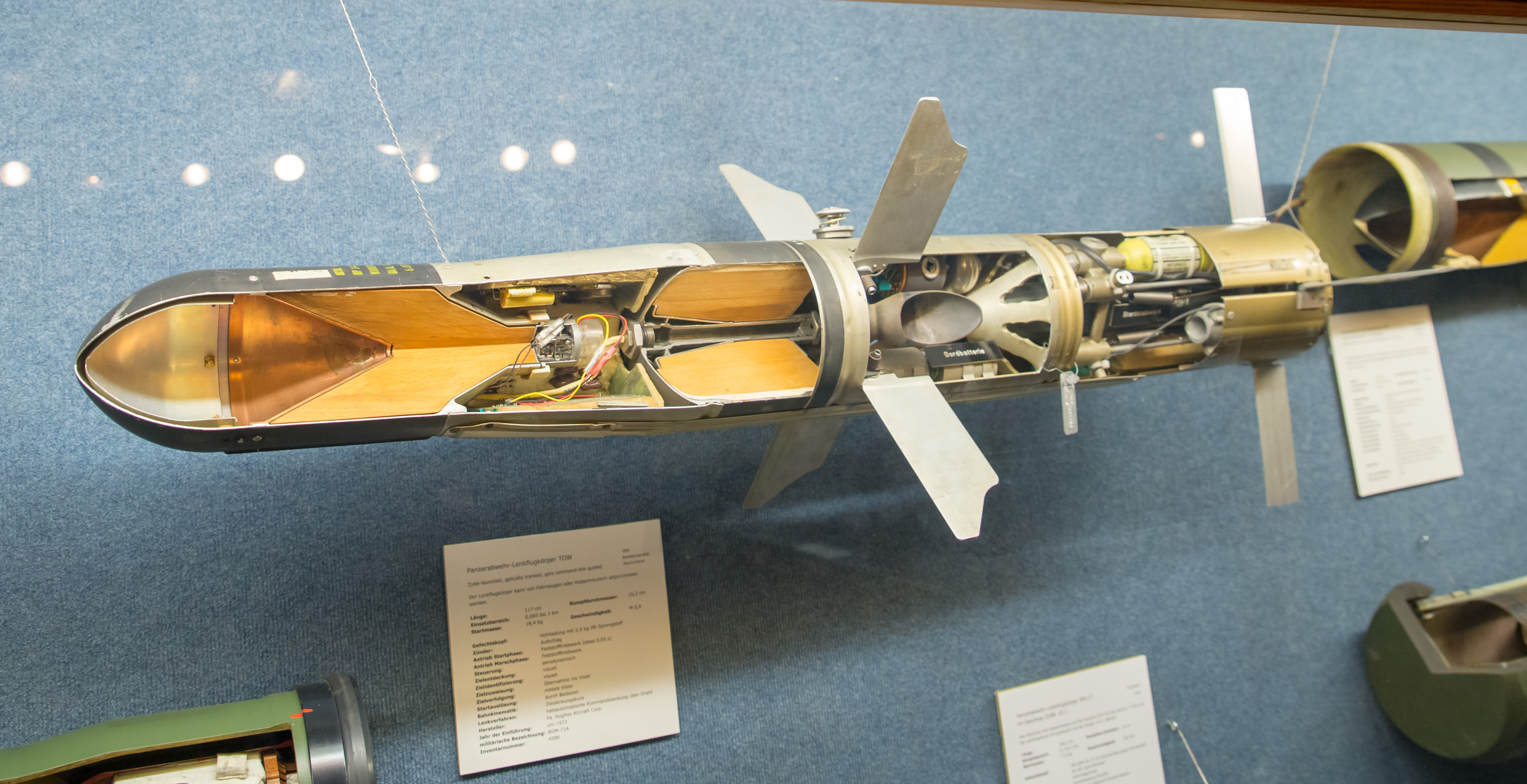 Wehrtechnische Sammlung der Bundeswehr